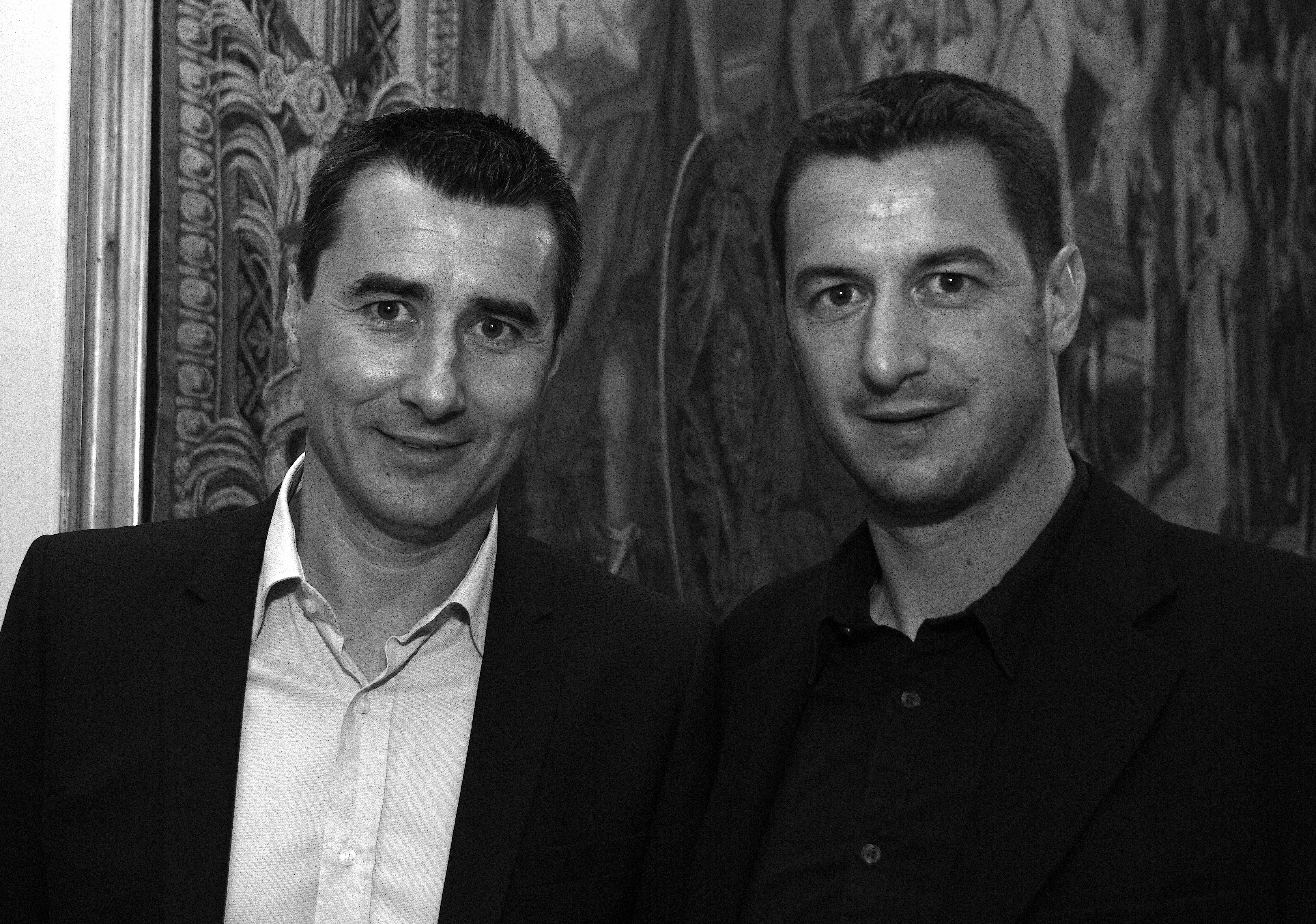 Marc et François Keller Racing Club de Strasbourg Alsace